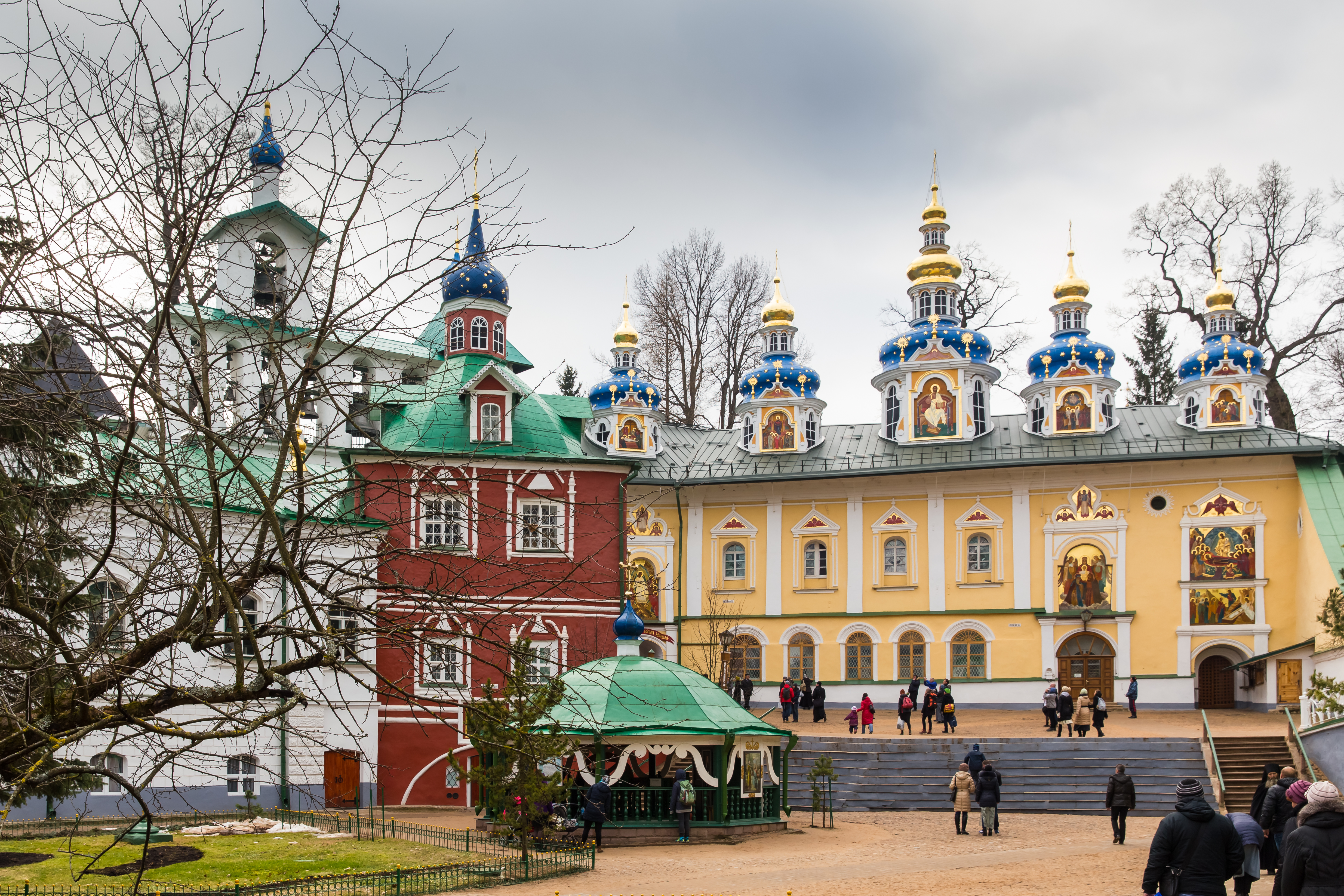 Ансамбль Псково-Печерского монастыря: (на юго-восточной окраине города Печоры), Печоры, Печорский район, Псковская область